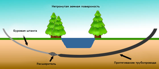 Схема ГНБ.